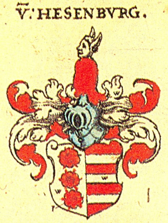 Ritterschaft und Adel in Franken Wappen der fränkischen Adelsfamilie Hesenburg (Hasenburg?)